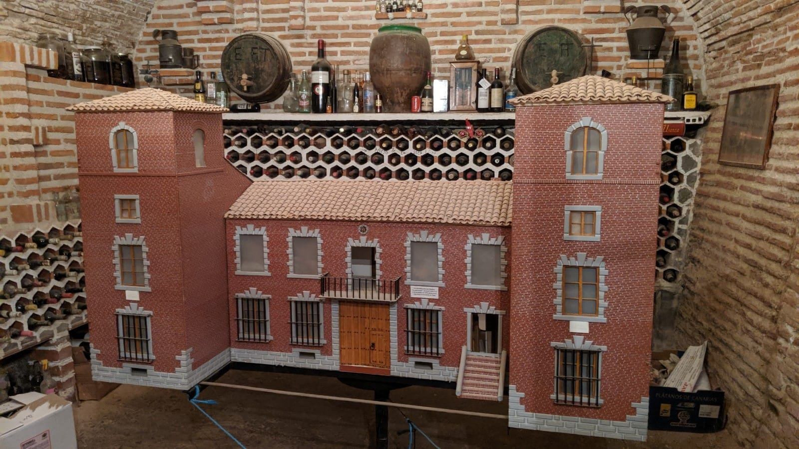 Maqueta del palacio de Horcajo de las torres. Se encuentra en la bodega del palacio bajo su torre izquierda.